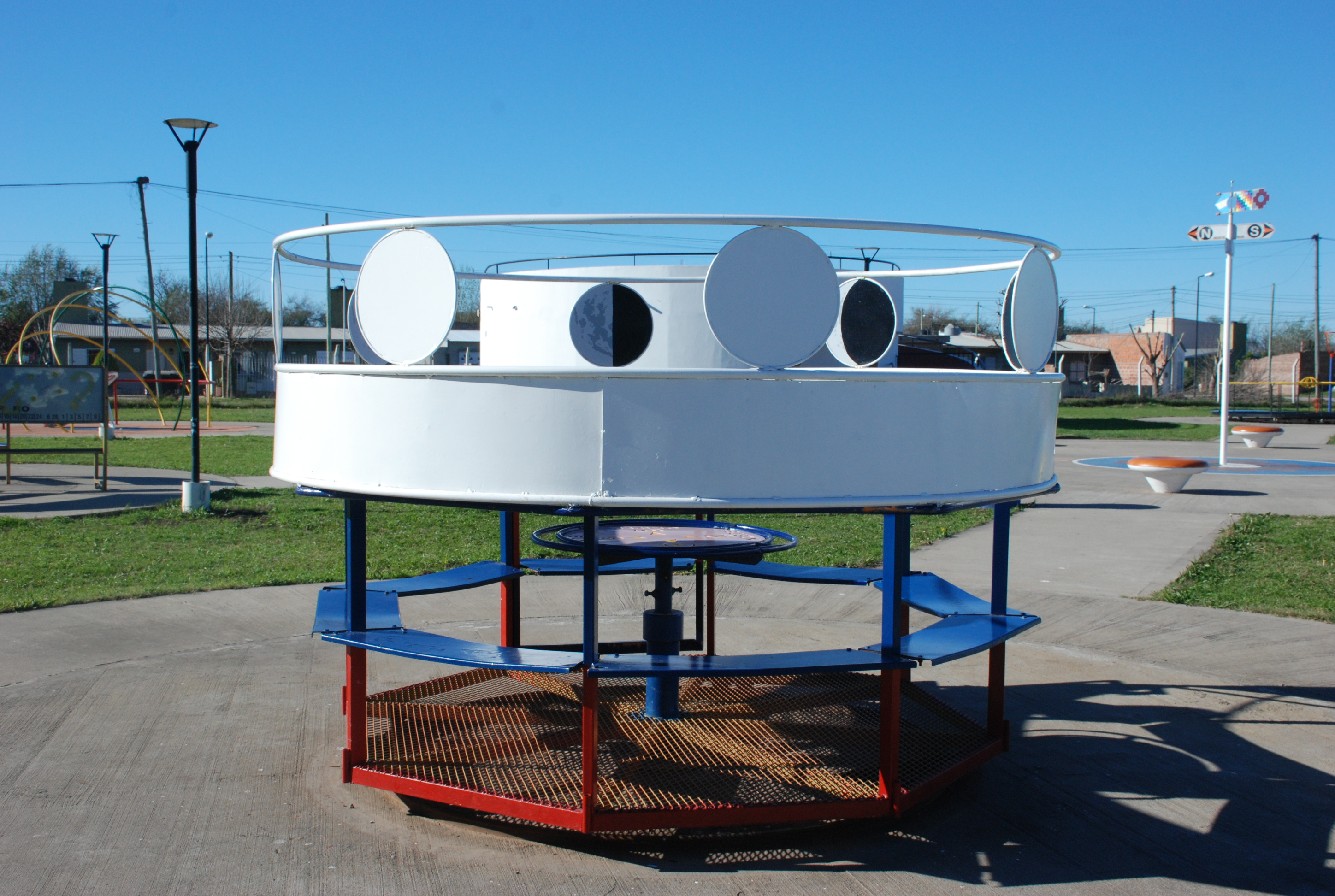 Calesita lunar del Parque Cielos del Sur, Chivilcoy, provincia de Buenos Aires.